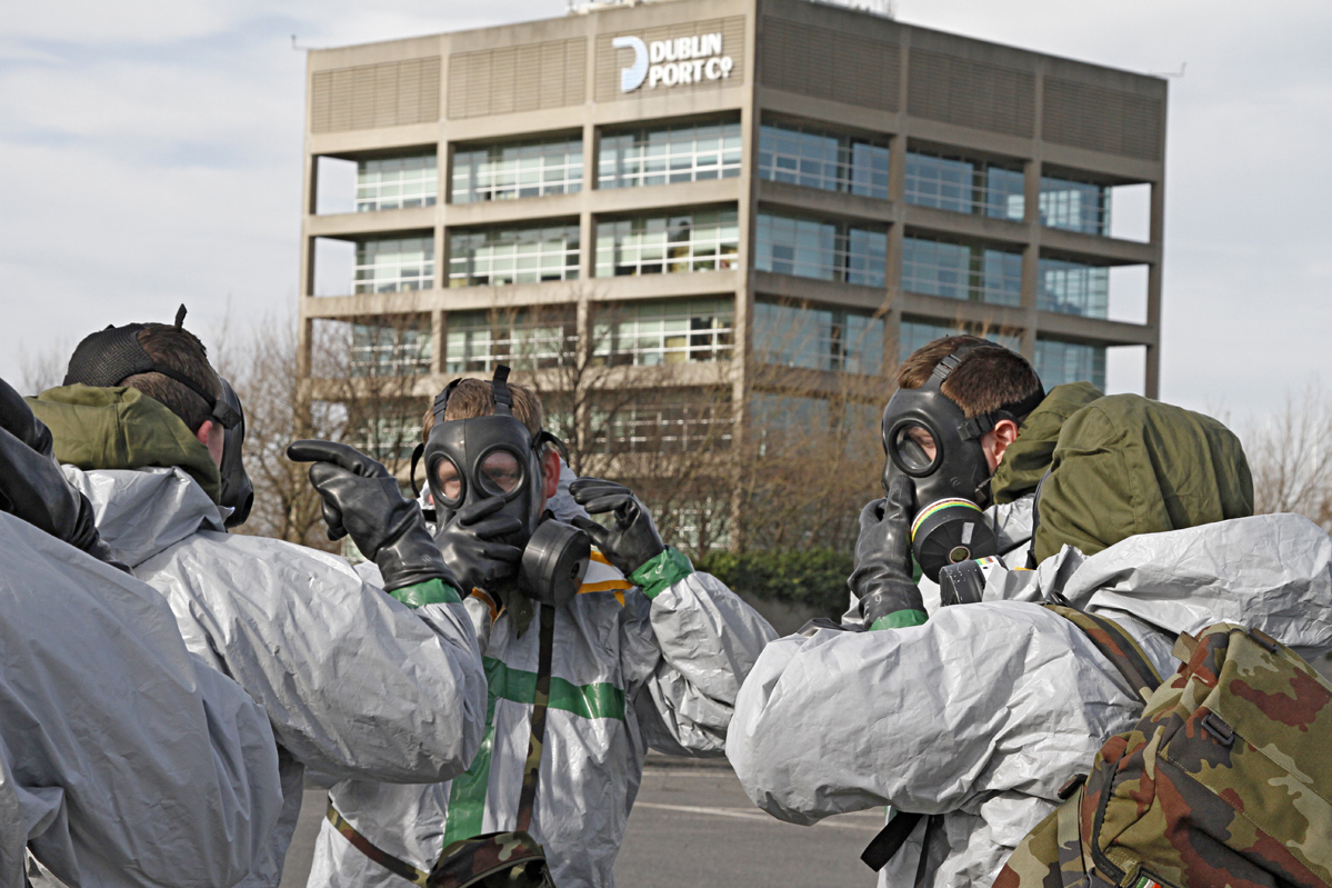 EOD Exercise Dublin Port